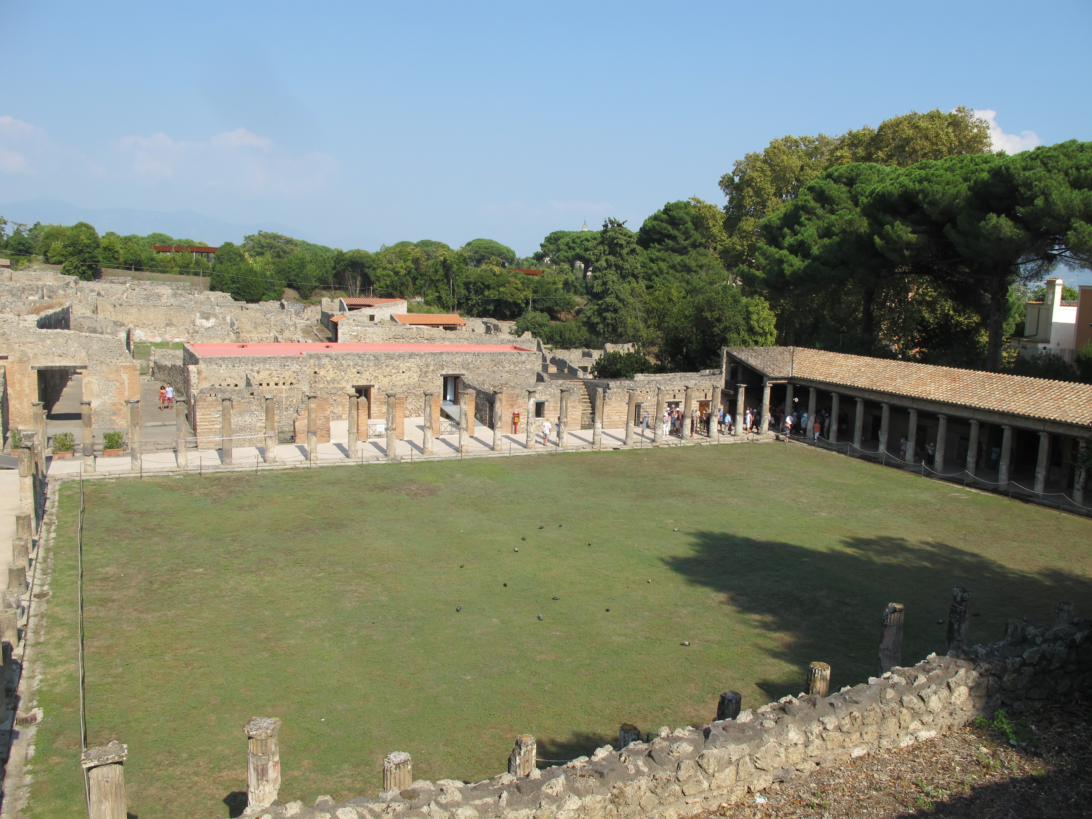 Pompei 2012